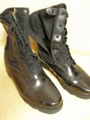 디지털 카메라로 직접제작